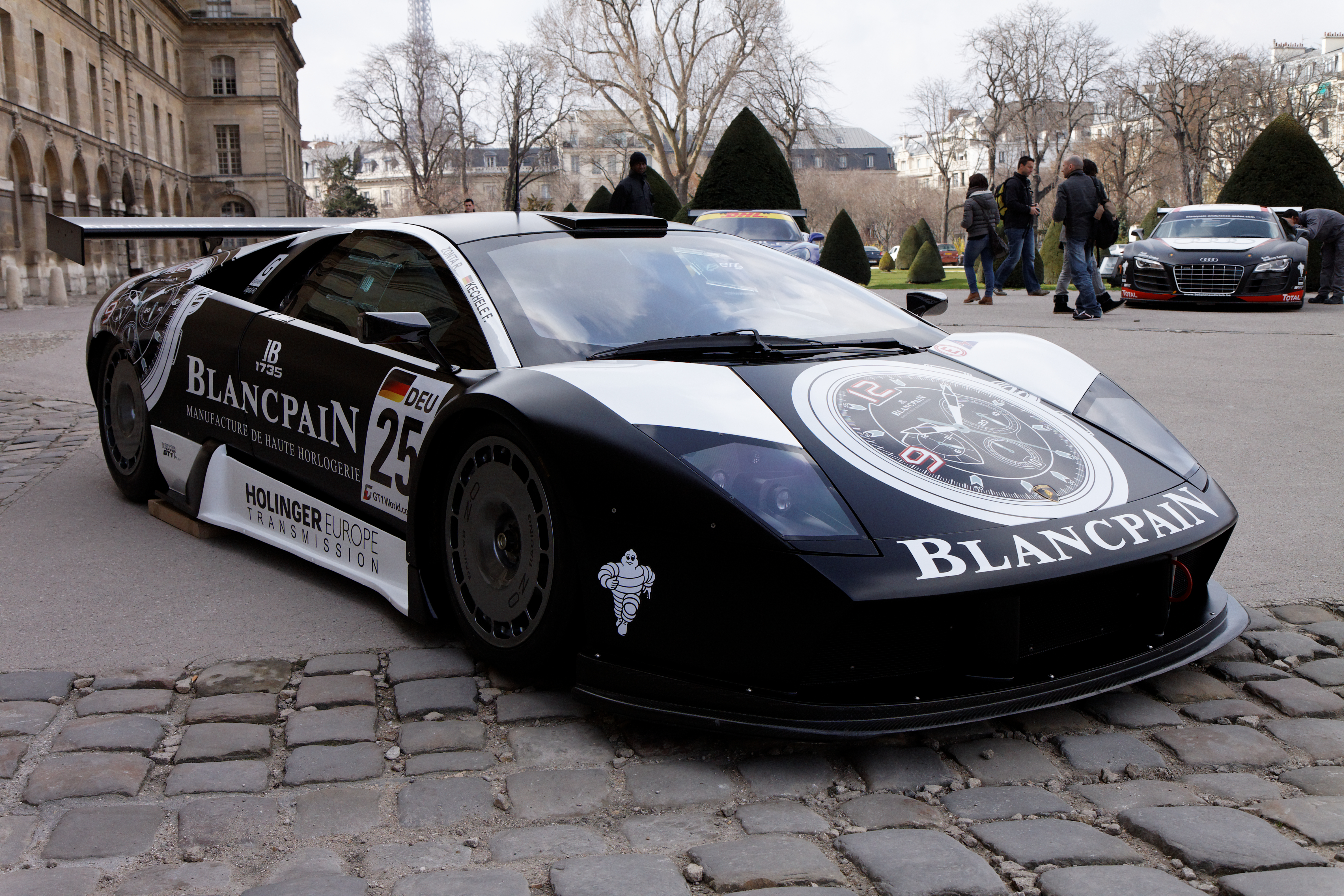 Photographie prise lors de la présentation du Blancpain Endurance series aux Invalides à Paris en mars 2011.